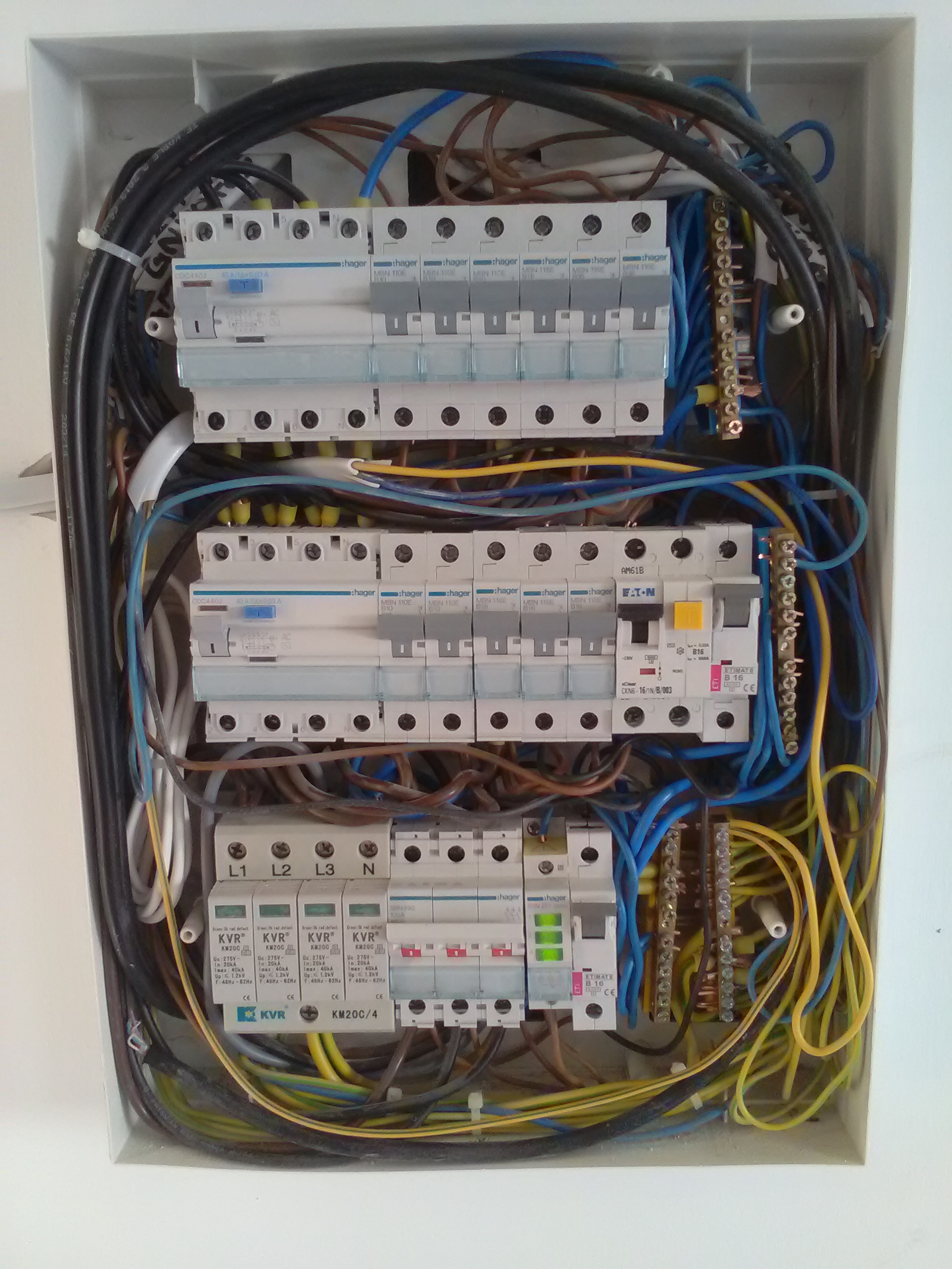 Aparaty zamontowane na szynie TH 35 rozdzielnicy natynkowej.